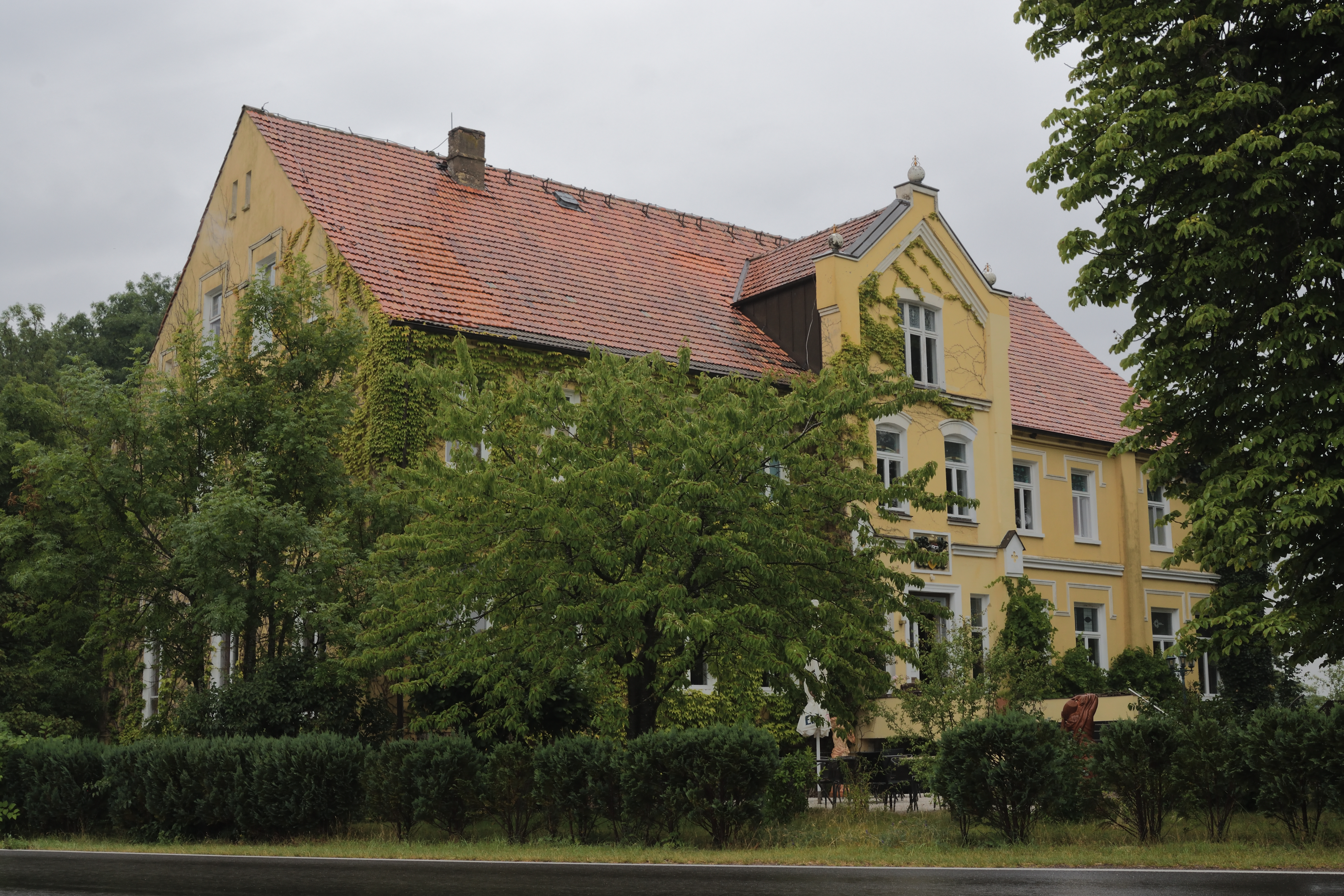 Domäne Neu Gaarz, Mecklenburg